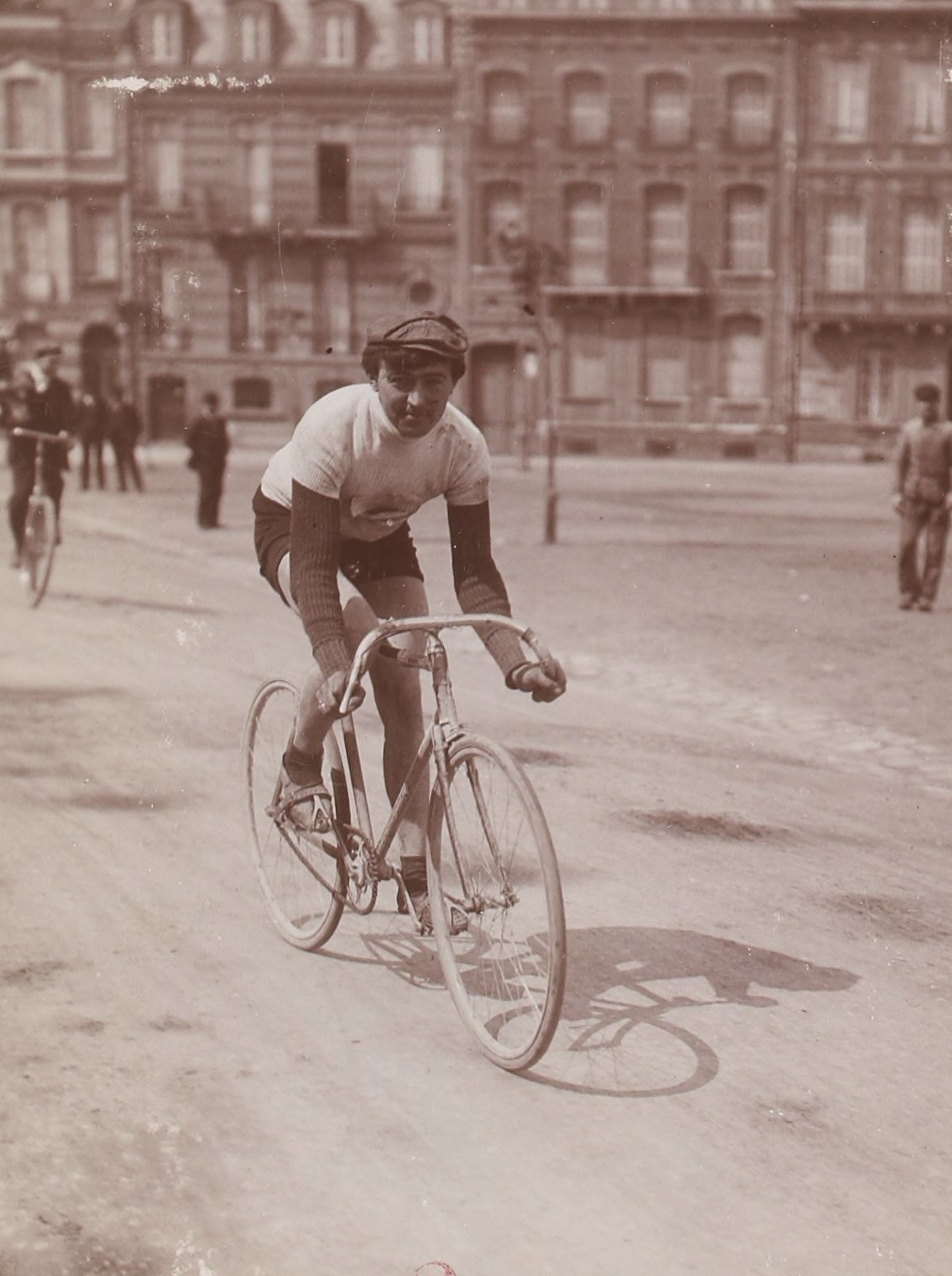 [Collection Jules Beau. Photographie sportive] : T. 33. Années 1906 et 1907 / Jules Beau : F. 47v. [Paris-Dieppe. 19 mai 1907]